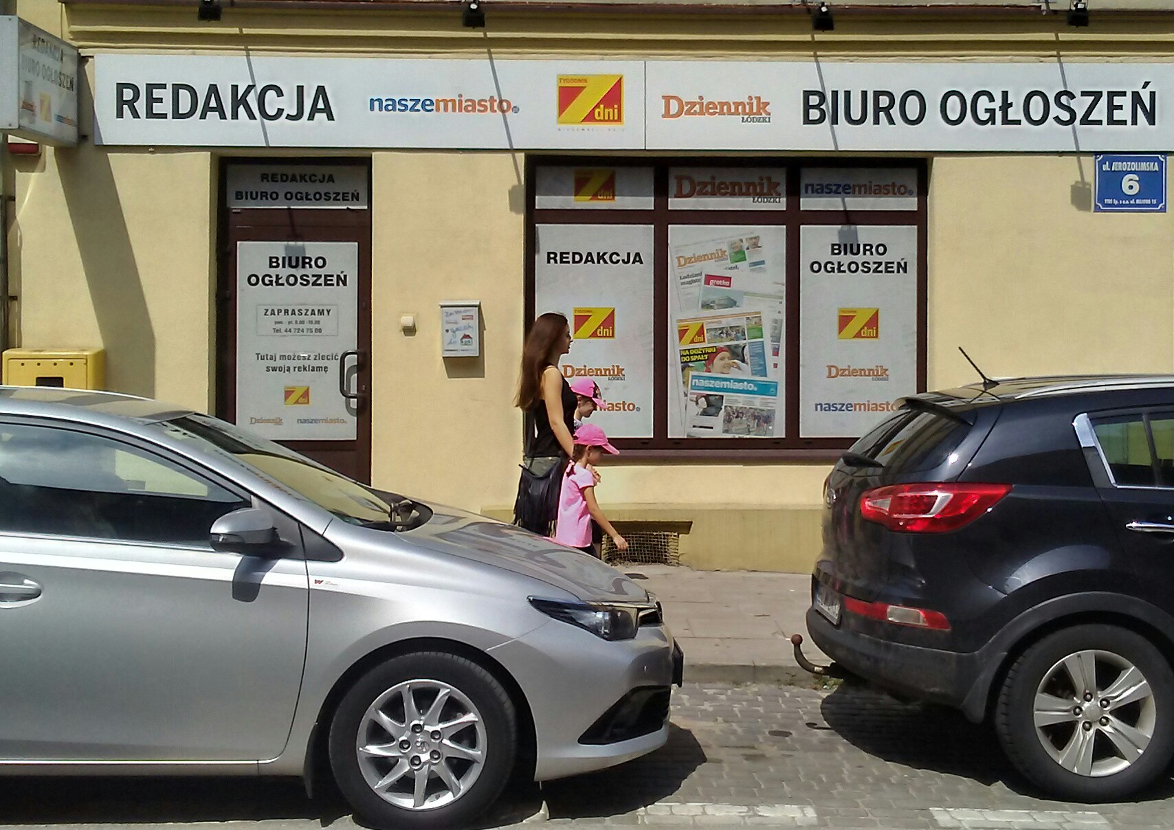 Tomaszowska redakcja niemieckiego wydawnictwa Polska Press (wydawca m.in. Dziennika Łódzkiego i Naszego Miasta)